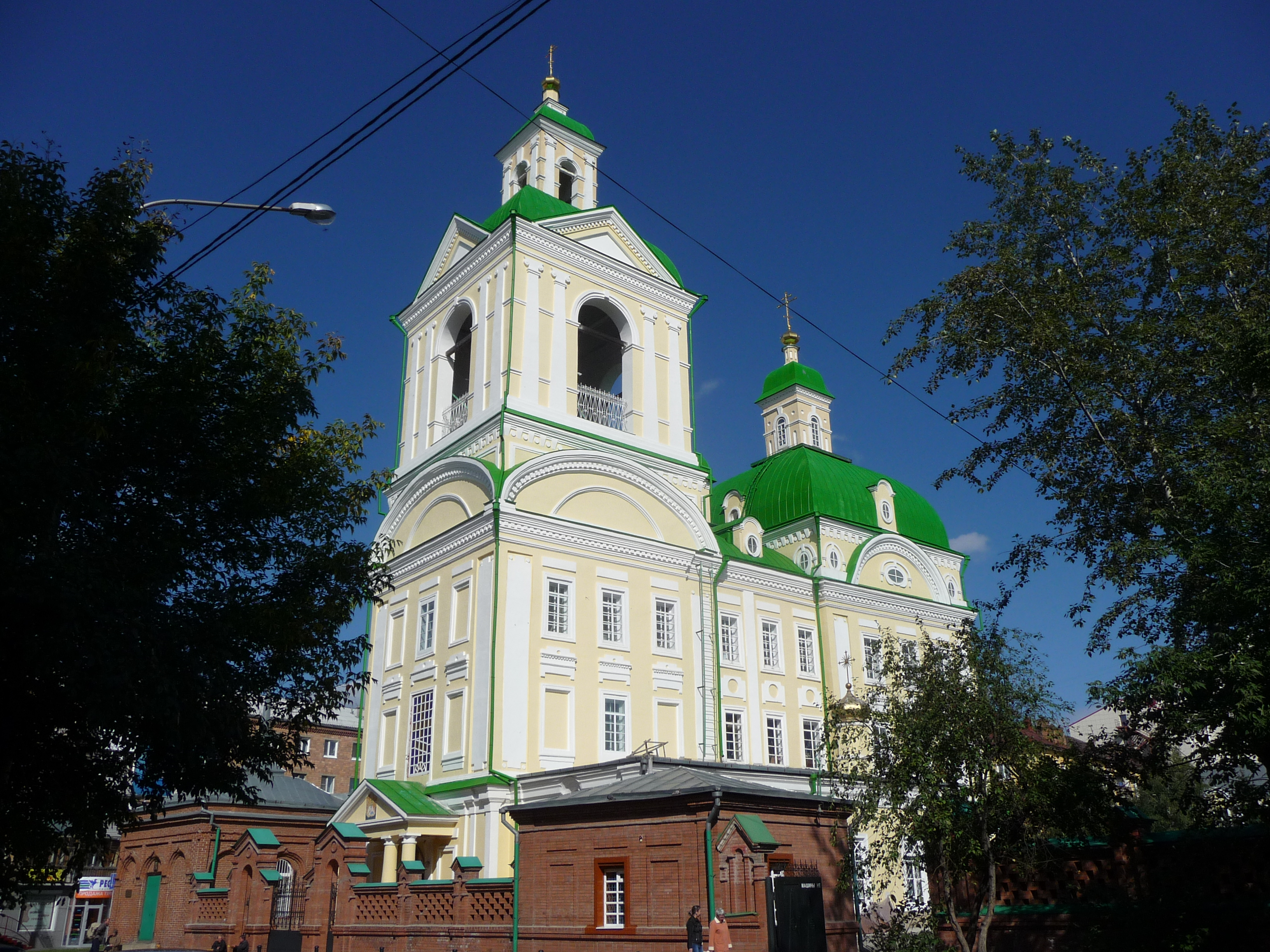 Благовещенская церковь, Красноярск